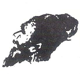 Saints of India, taught the Tamils to find God within their-self, not in temples, through his lyric poems in Tamil. A book by name “theiva Alai”, author Sengai Pothuvan, published in 2007.